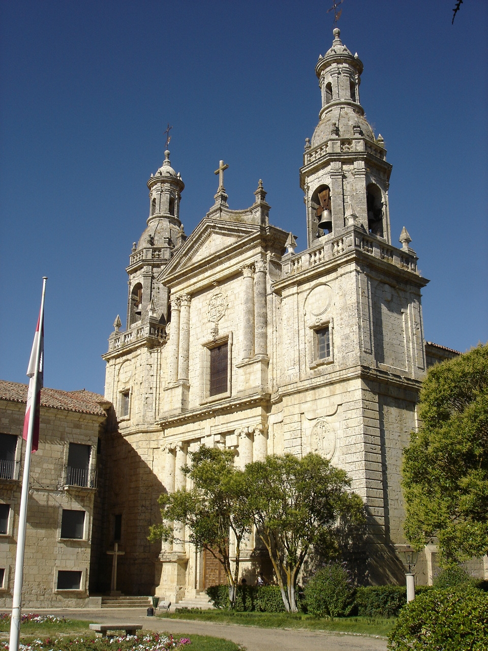 Fachada barroca del Monasterio de la Santa Espina (Valladolid, España)